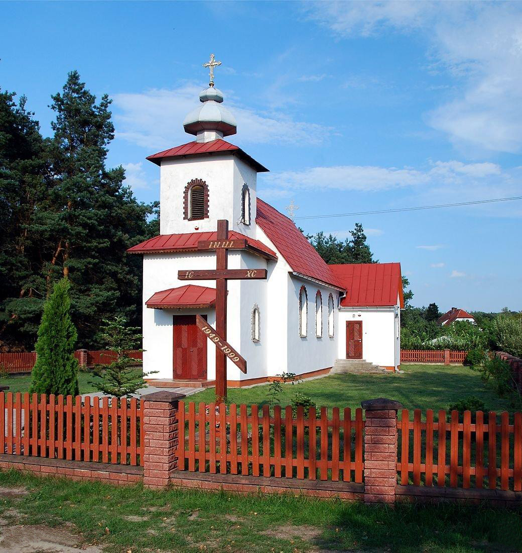 Cerkiew św. Michała Archanioła w Lipinach k/Nowej Soli.